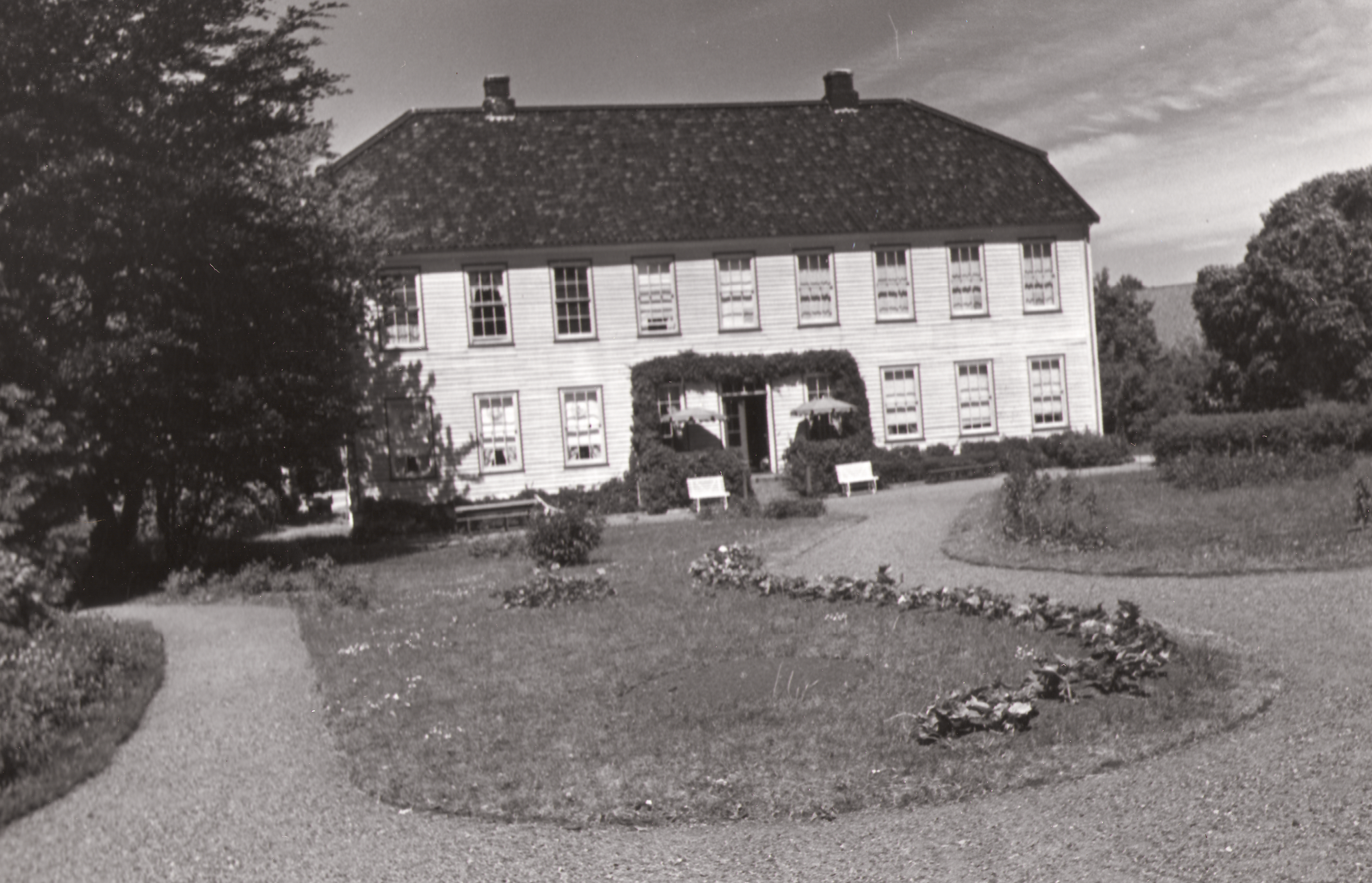 Boen i Tveit, Vest-Agder